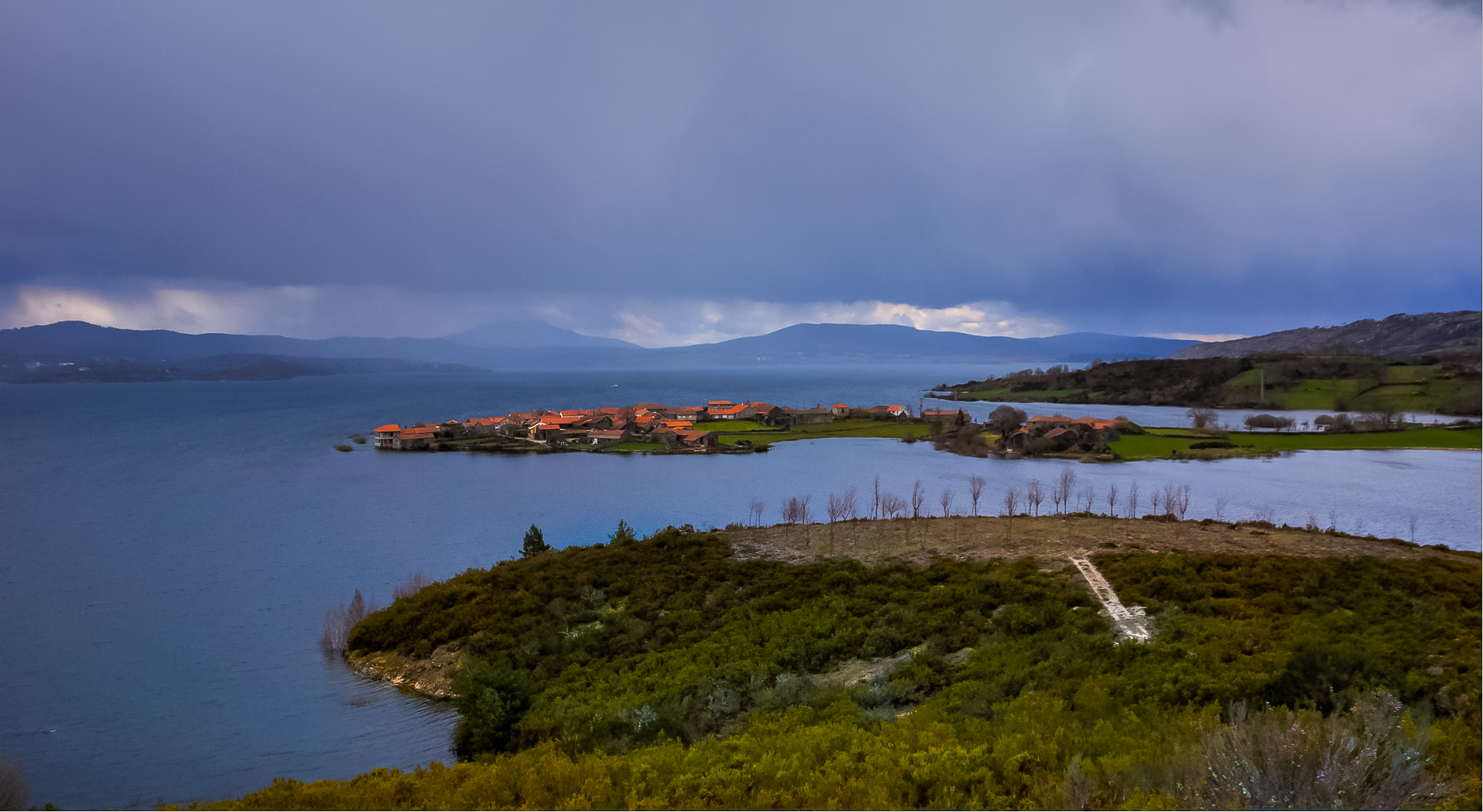 Portugal